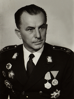 Srpski (latinica): General-potpukovnik Božidar Kraut Inventarski broj:MIJ-2438-005